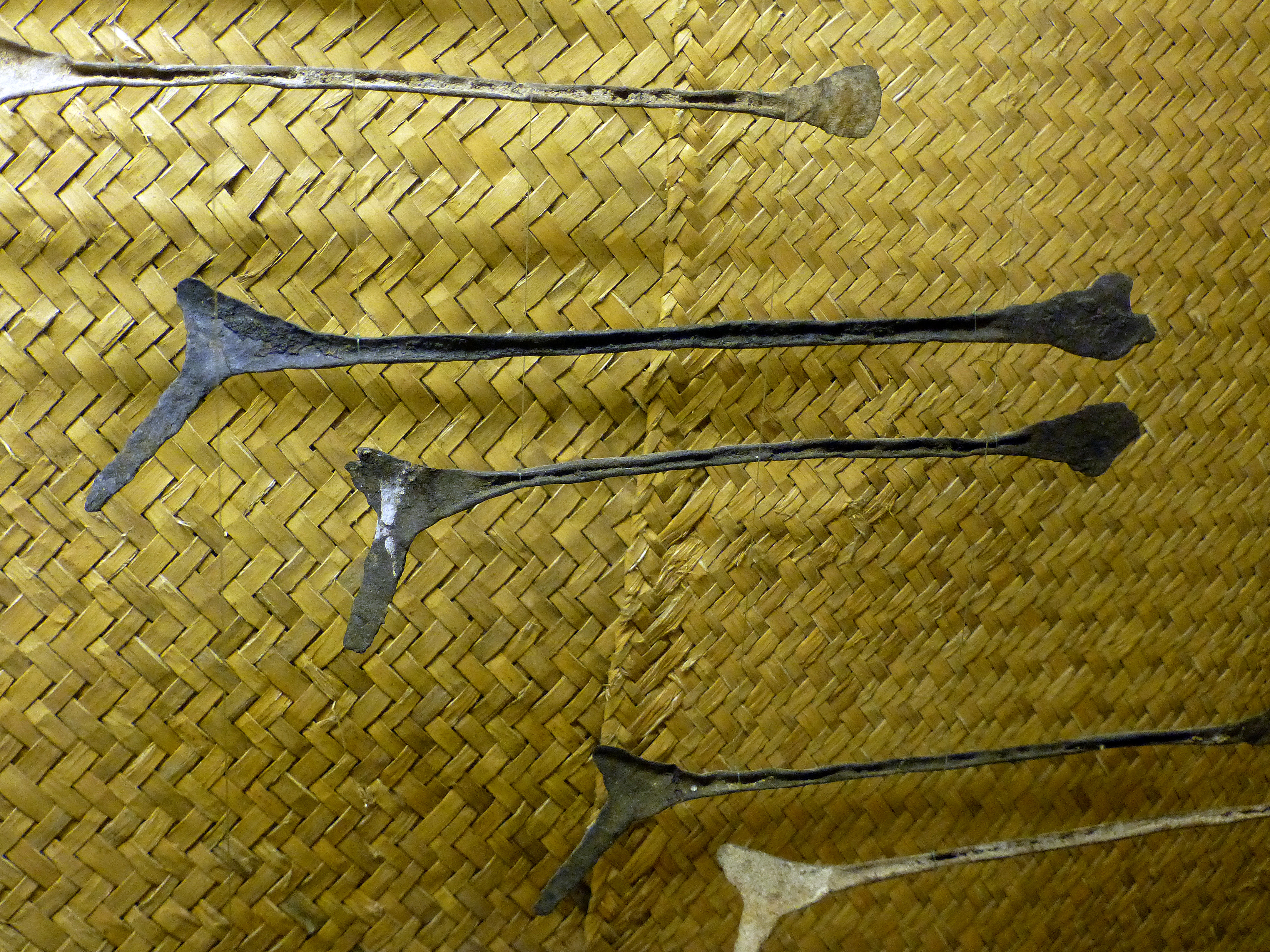 Barrettes bro (monnaie) Gouro (Botro). Côte d'Ivoire, 19e siècle. Fer, 23 cm. Musée africain de Lyon